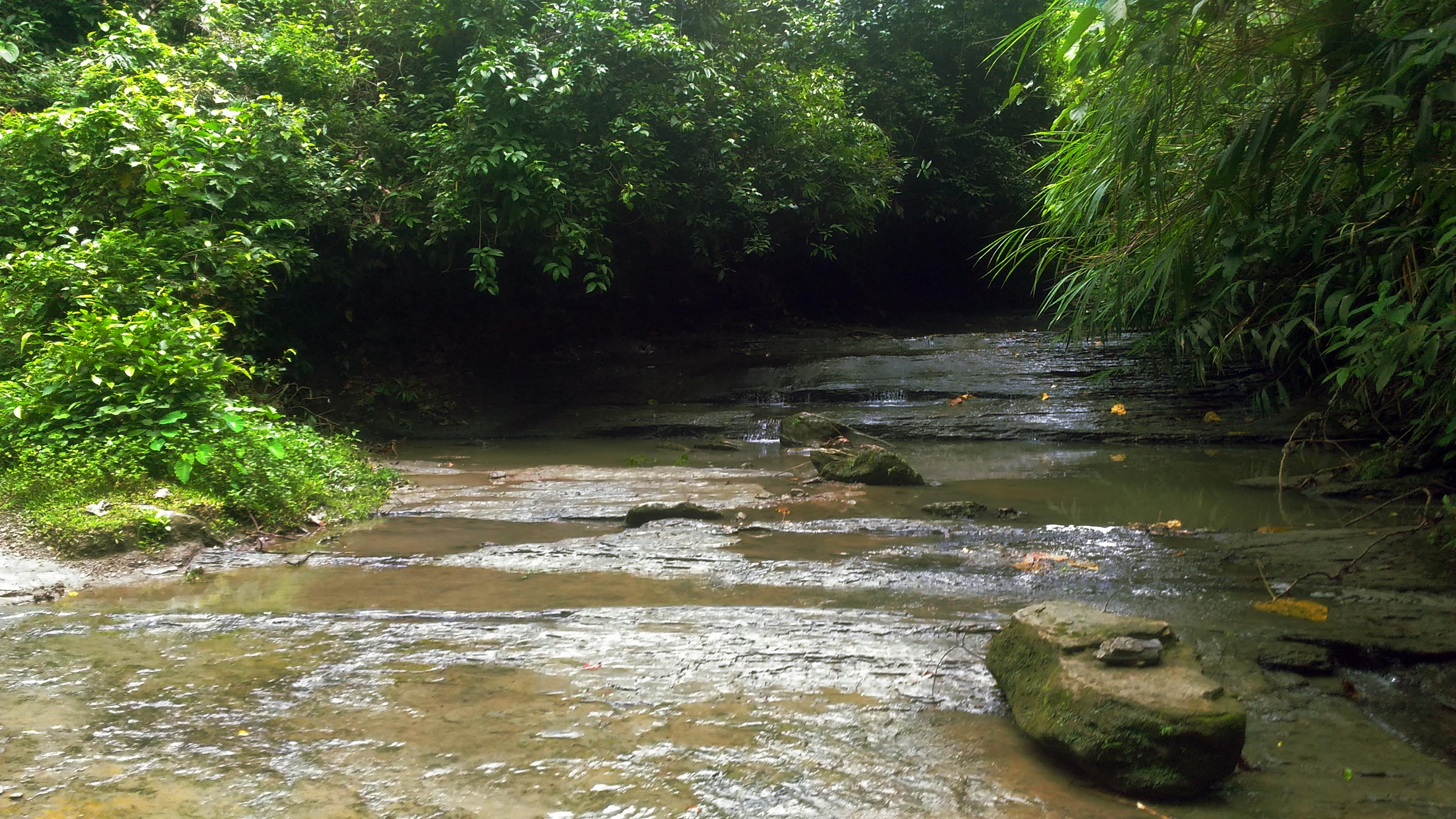 চুনাতি বন্যপ্রাণী অভয়ারণ্য